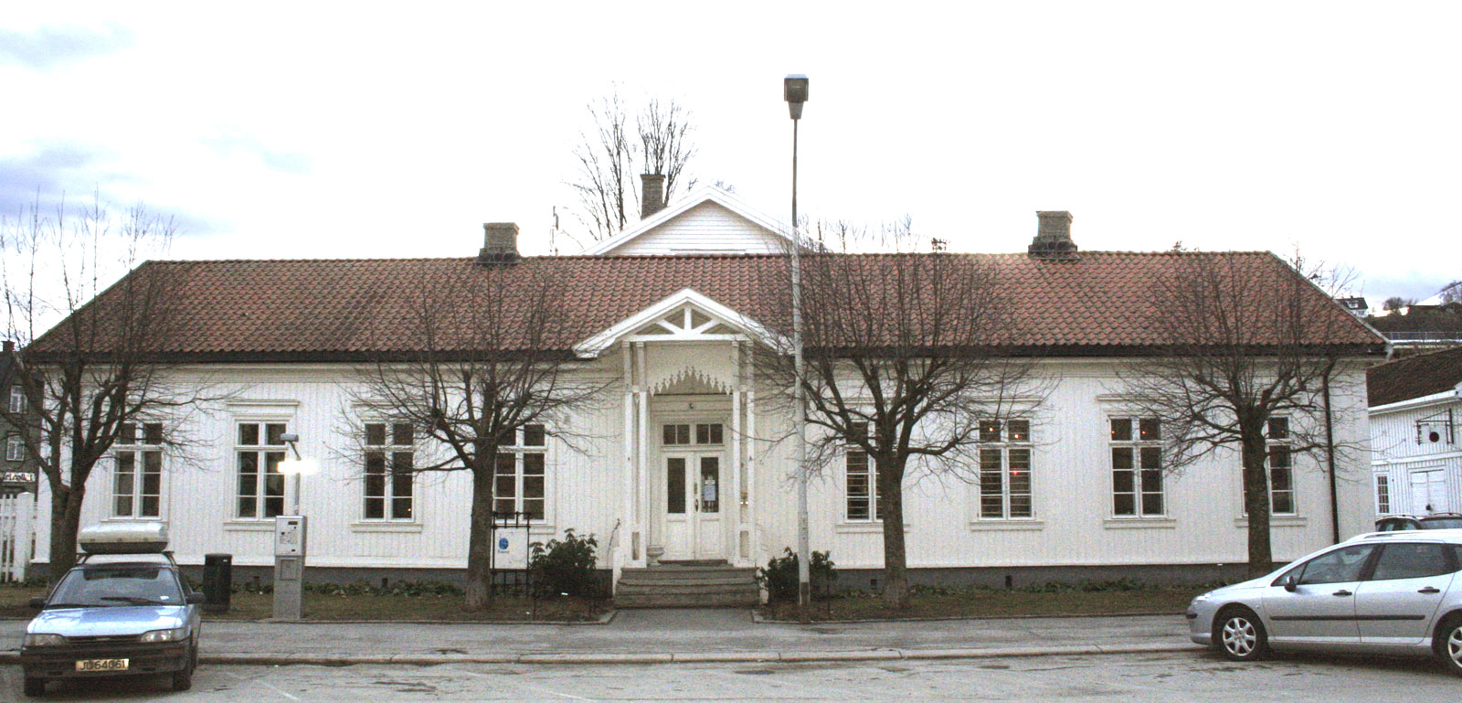 Hønefoss hjelpefengsel, fasade mot øst